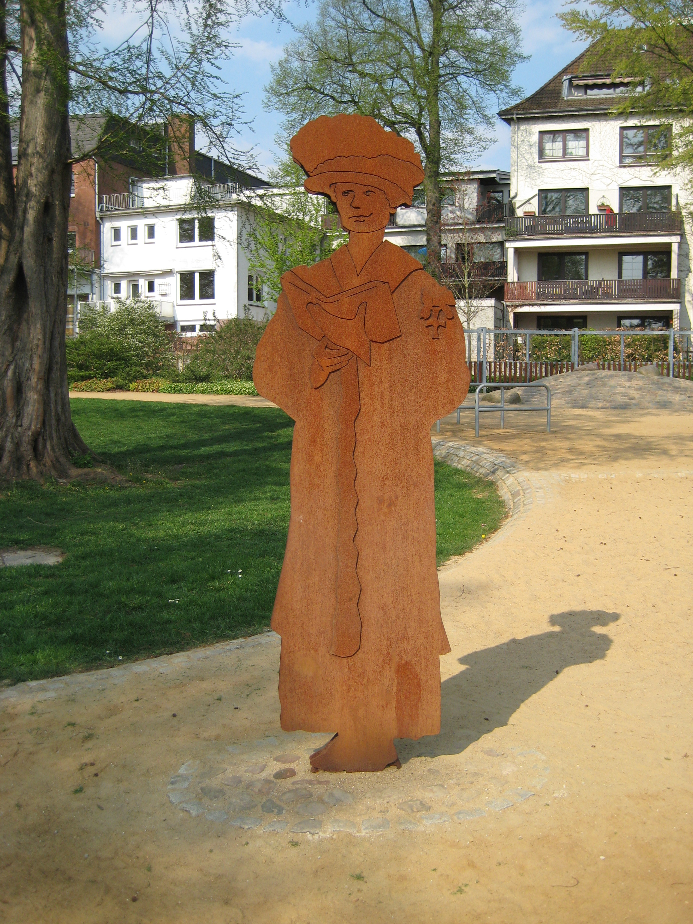 Prinzeßhof Itzehoe; scupture of abbess Prinzessin Marie von Schleswig-Holstein-Sonderburg-Glücksburg (* 31. Aug. 1859, † 26. Jun. 1941)